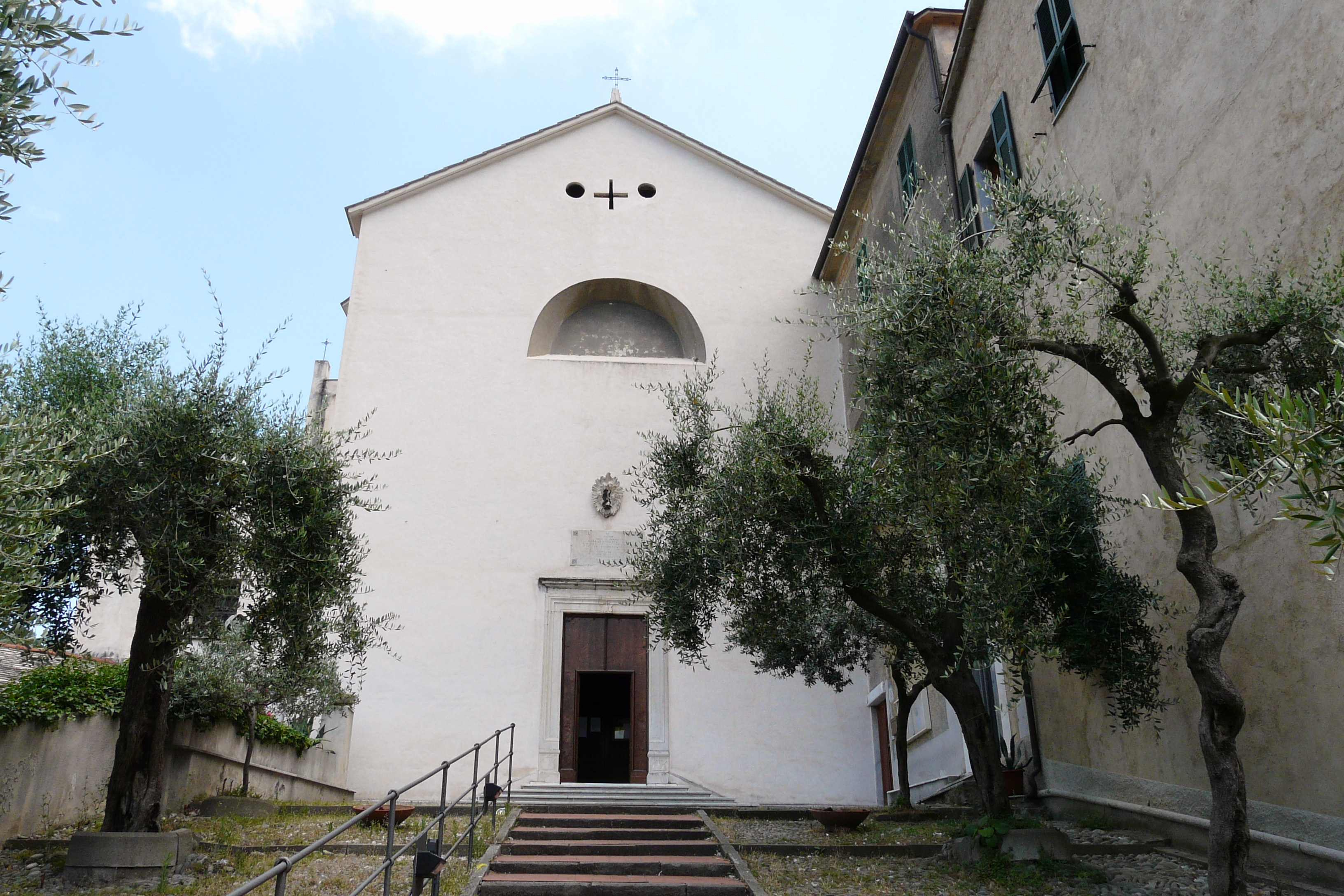 Santuario delle Grazie, Porto Venere, Liguria, Italia